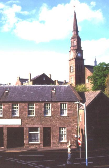 Forfar